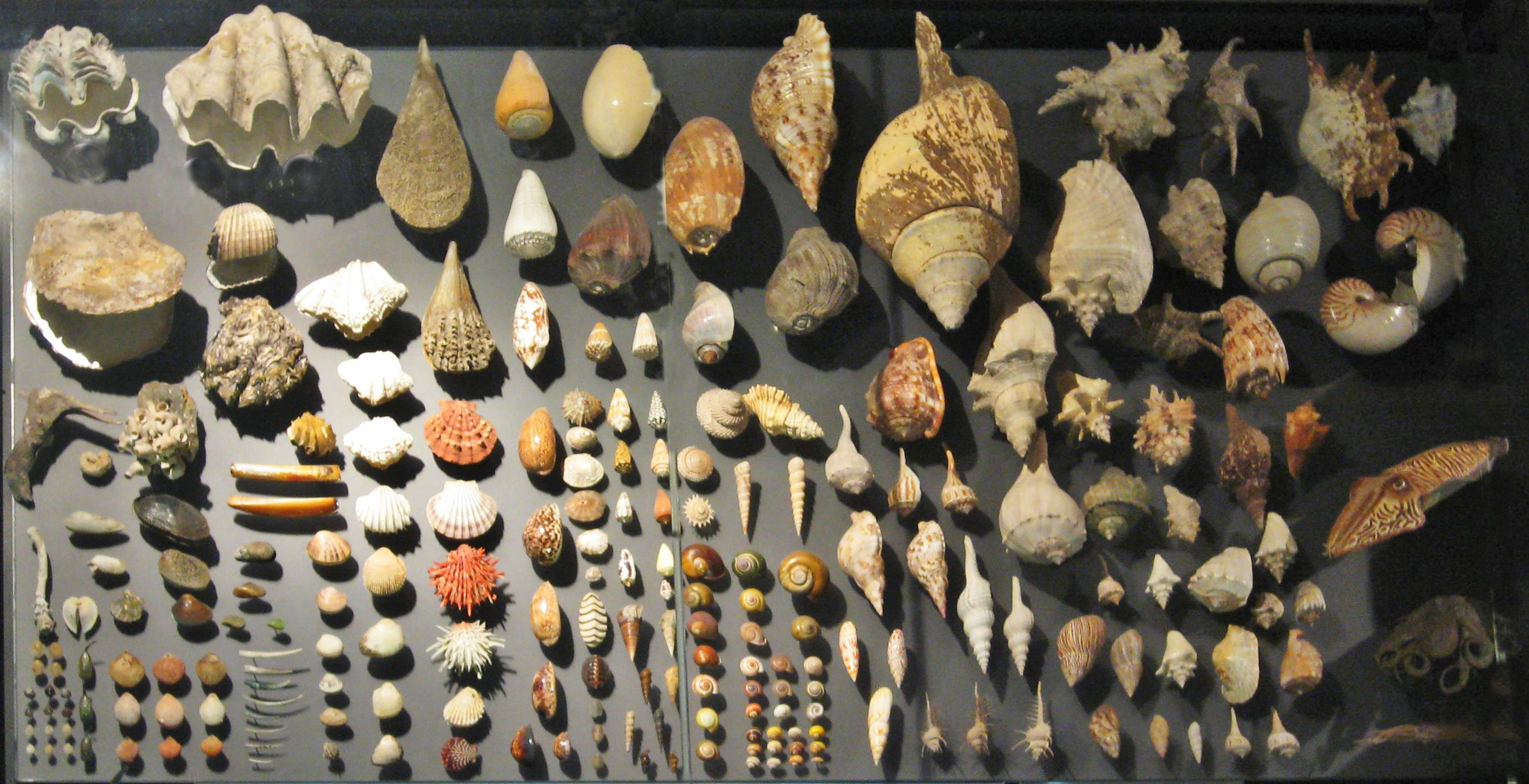 Muscheln